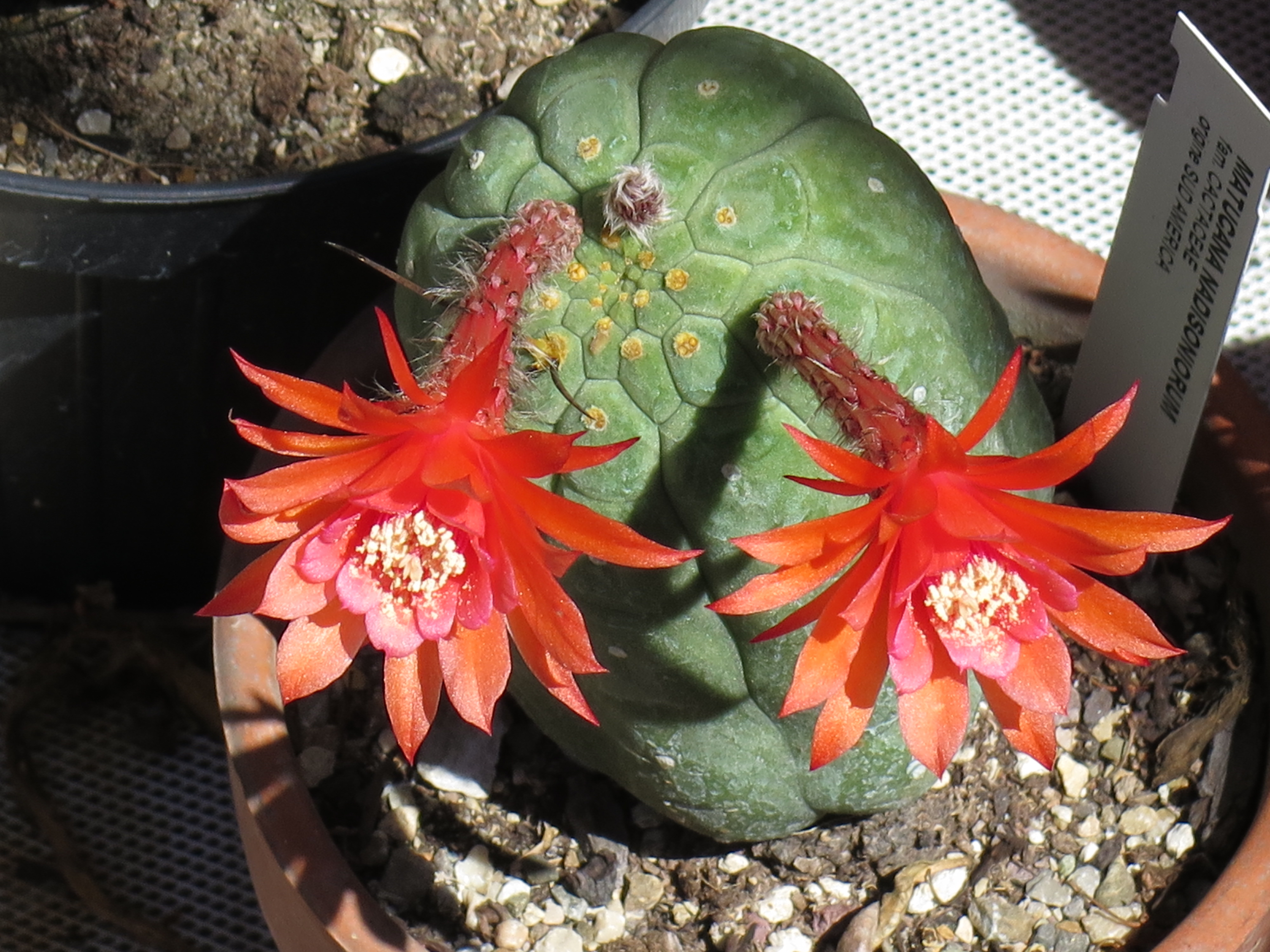 Matucana madisoniorum in fiore